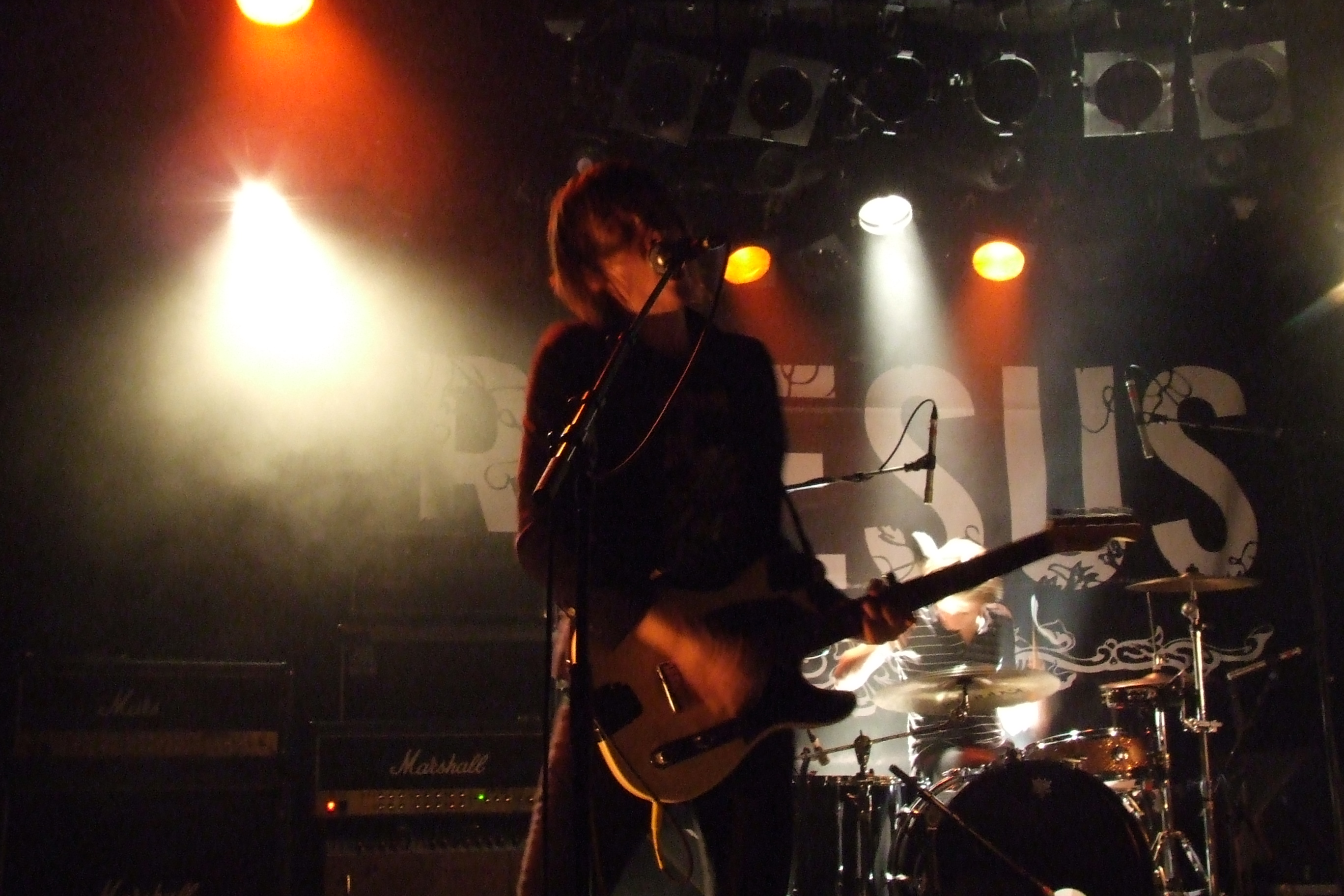 Rhesus en concert à La Laiterie à Strasbourg le 27 novembre 2006